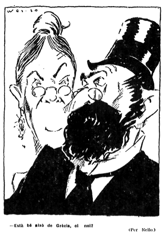 378 23,6,35 humanitat